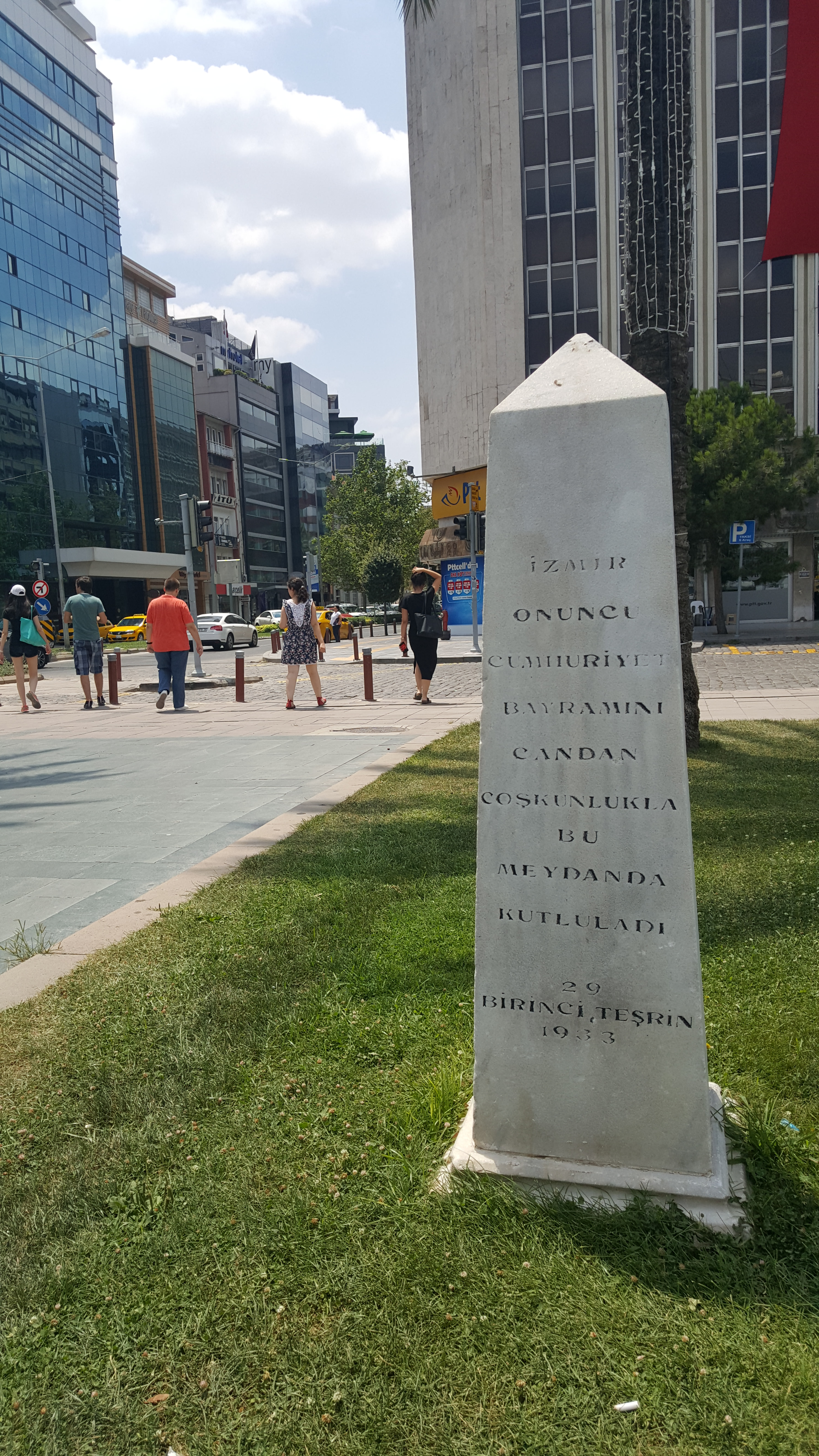 İzmir Cumhuriyet Meydanı'na 1933 yılındaki Cumhuriyetin Onuncu Yıl Kutlamaları anısında dikilmiş anıt.